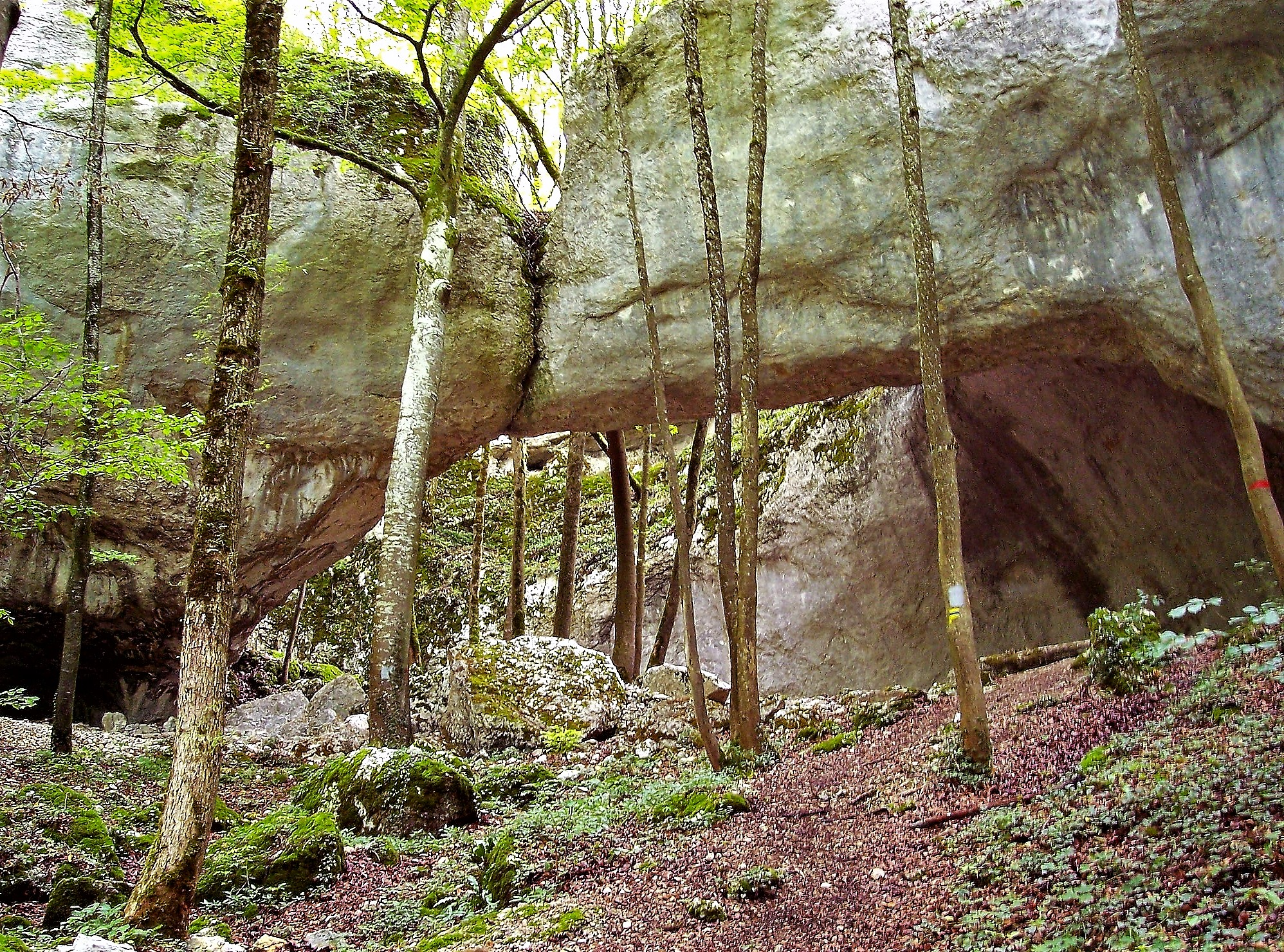 Arche du Bisontin, vue du côté sud. Liebvillers. Doubs